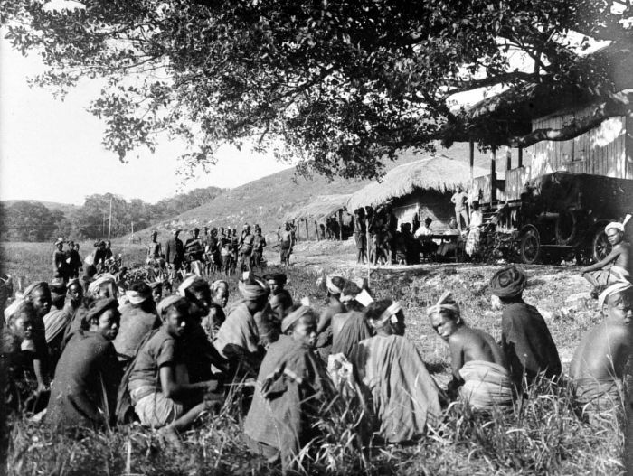 Repronegatief. Belastingheffing te Lewapahu, Midden-Sumba